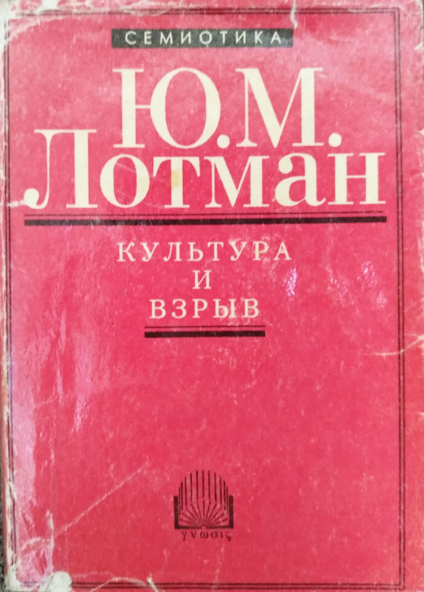 Յուրի Լոտման, «Մշակույթը և պայթյունը»